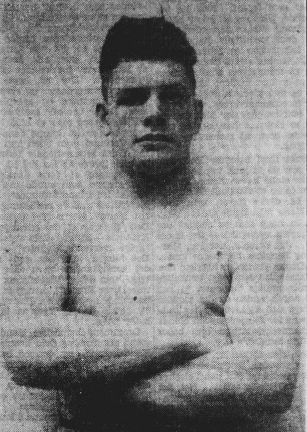 Magnus «Wolf» Larsen, norsk-amerikansk bokser.